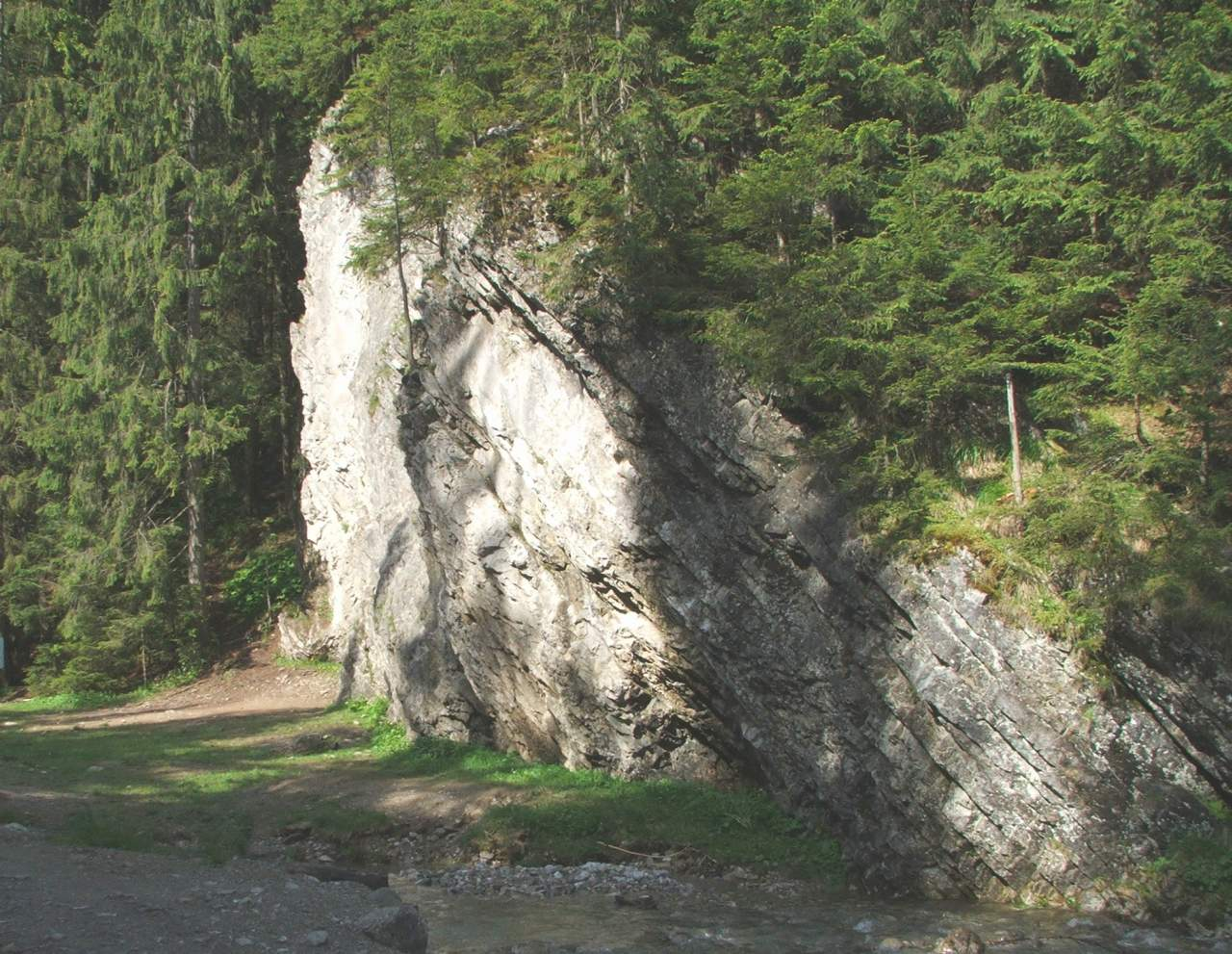 Między Ściany (Dolina Lejowa - Tatra Mountains)